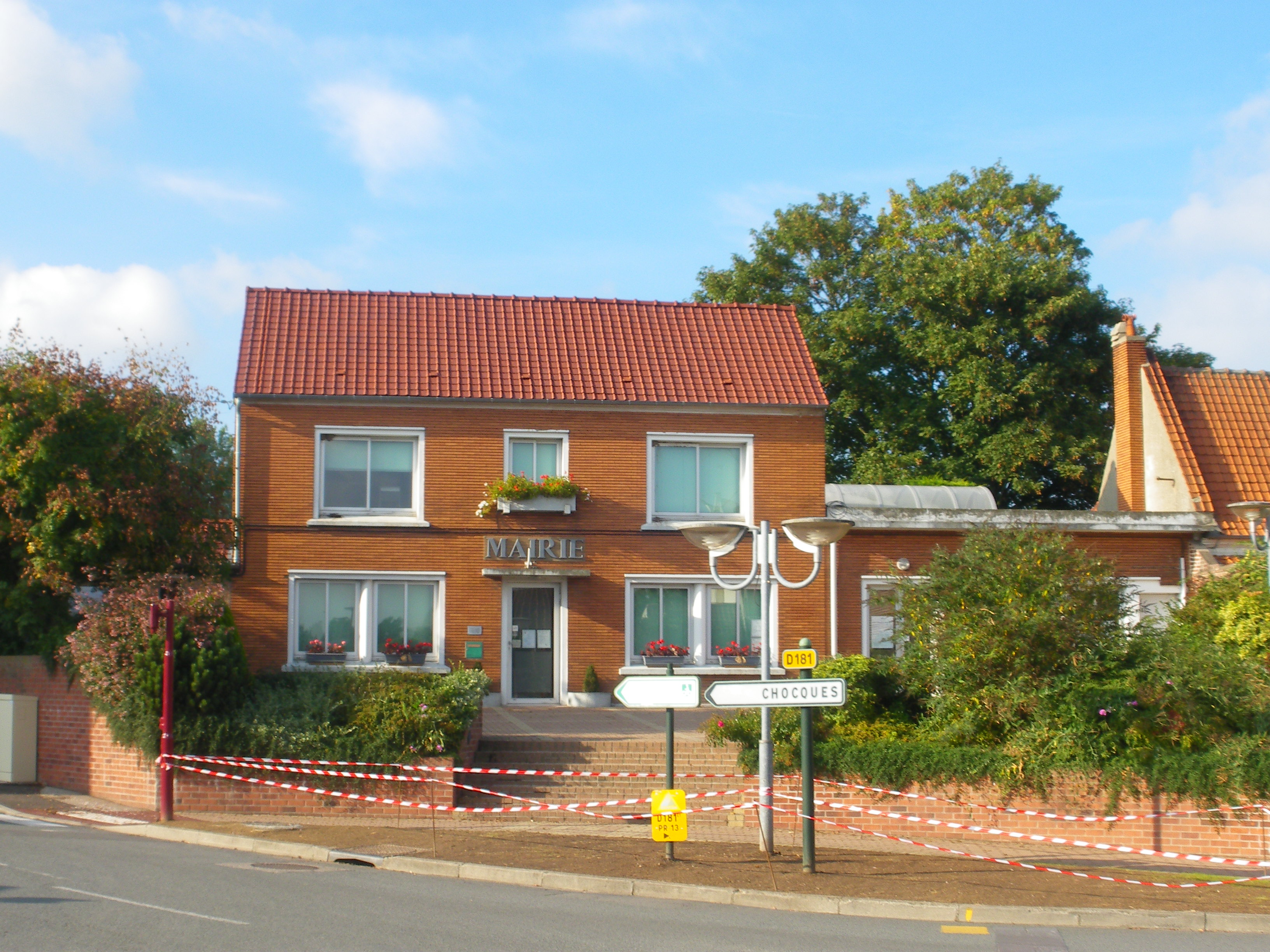 Vue de la mairie de Fouquereuil.